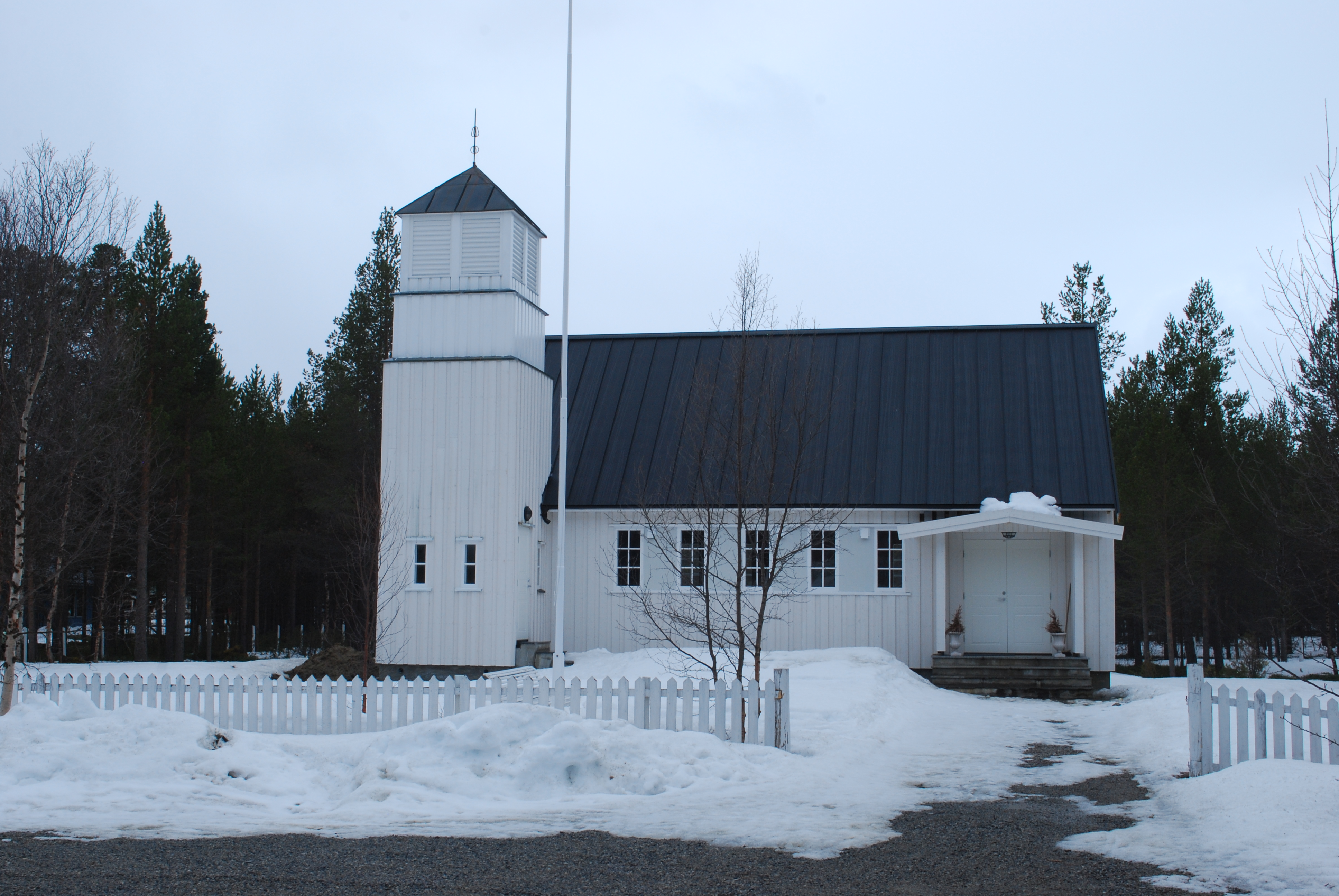 Skoganvarre kapell, bygget 1963, langs E6 sør for Lakselv i Porsanger kommune, Finnmark